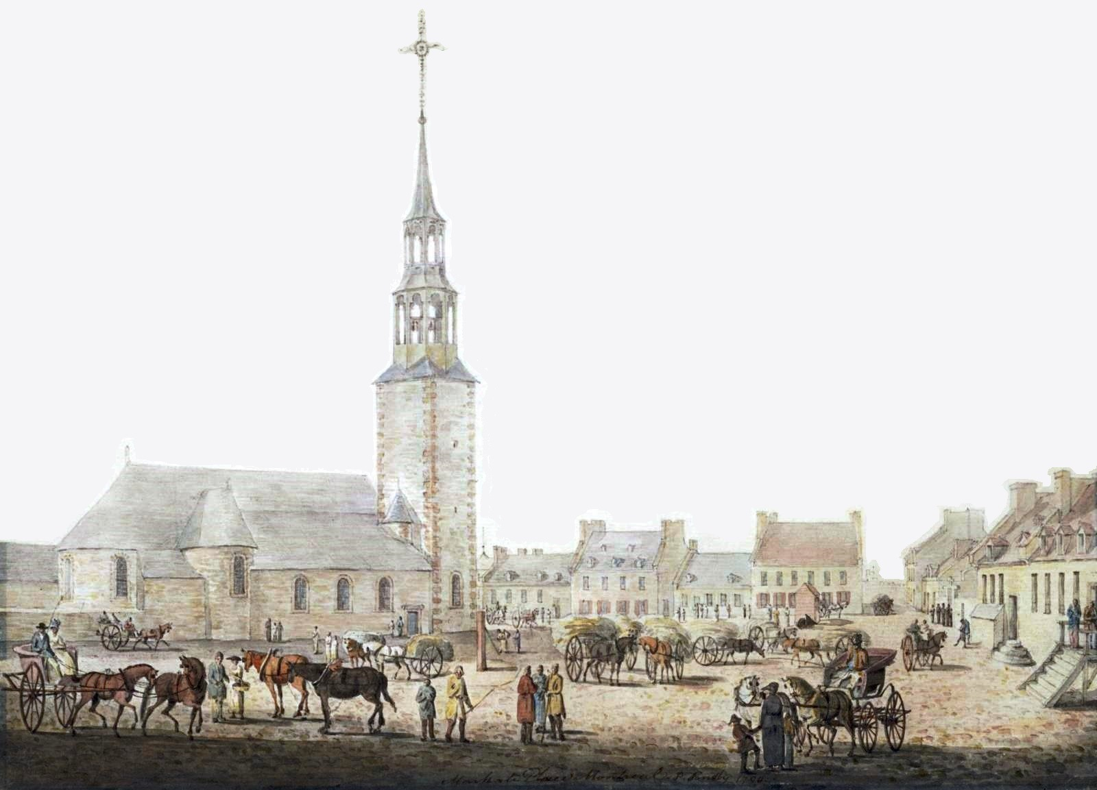 1790. La place du marché, Montréal, aquarelle de Paul Sandby junior